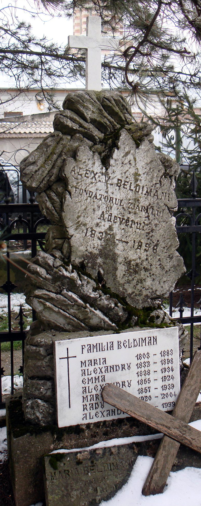 Mormântul lui Alexandru Beldiman în cimitirul mănăstirii Sămurcășești 03